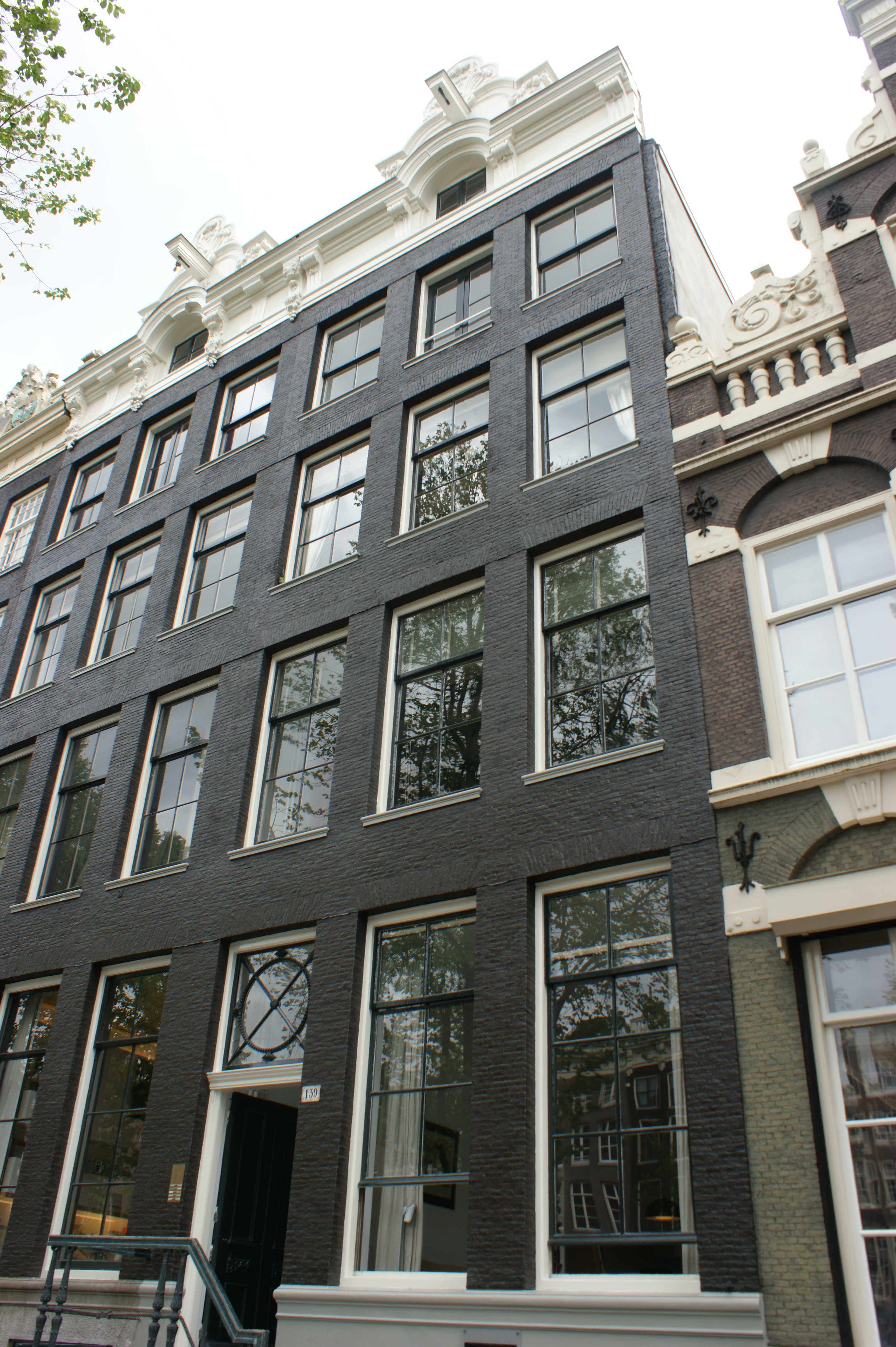 Amsterdam, Keizersgracht